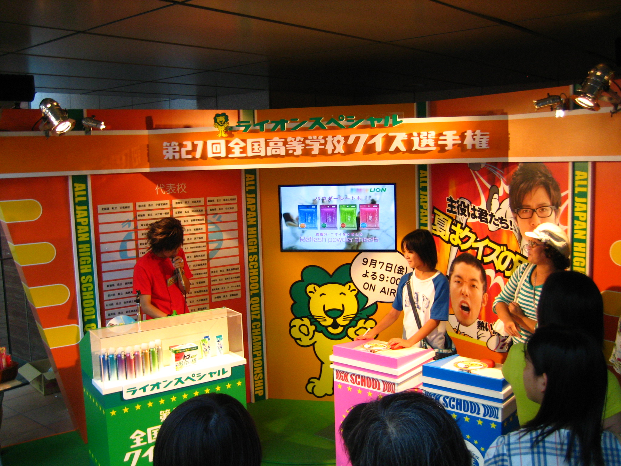 ライオンスペシャル 第27回全国高等学校クイズ選手権 体験ブース [1]